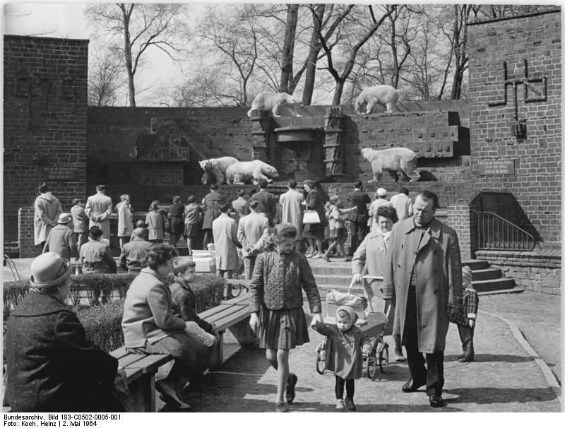 Leipzig, Eisbärengehege im Zoo Zentralbild Koch 2.5.1964 Der Leipziger Zoo wird jährlich von rund 1,5 Millionen Besuchern aufgesucht. Vor allem die Bärenburg (im Hintergrund) ist besonderer Anziehungspunkt. Insgesamt beherbergt der Zoo in seinen Gehegen, Ställen, Burgen, Höhlen und Aquarien 2000 Tiere in 650 Arten und etwa 4000 Fische.